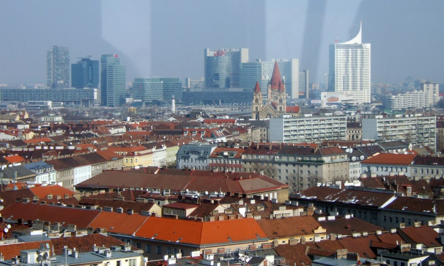 Skyline der Donau City vom Wiener Riesenrad aus gesehen